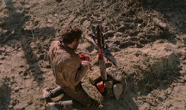 screenshot da Django